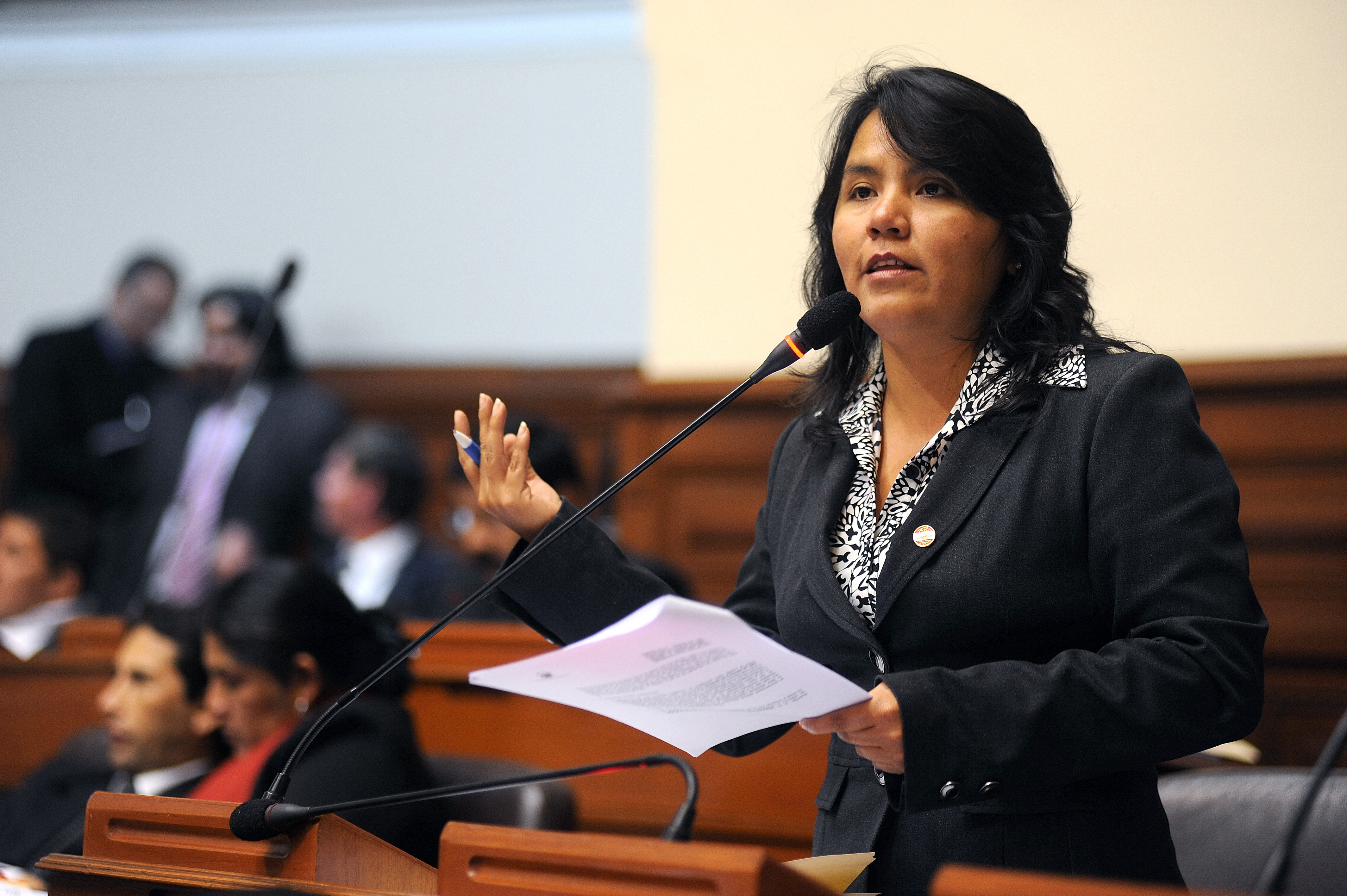 La congresista Yaneth Cajahuanca Rosales fija su posición en el debate parlamentario realizado esta tarde por el Pleno.